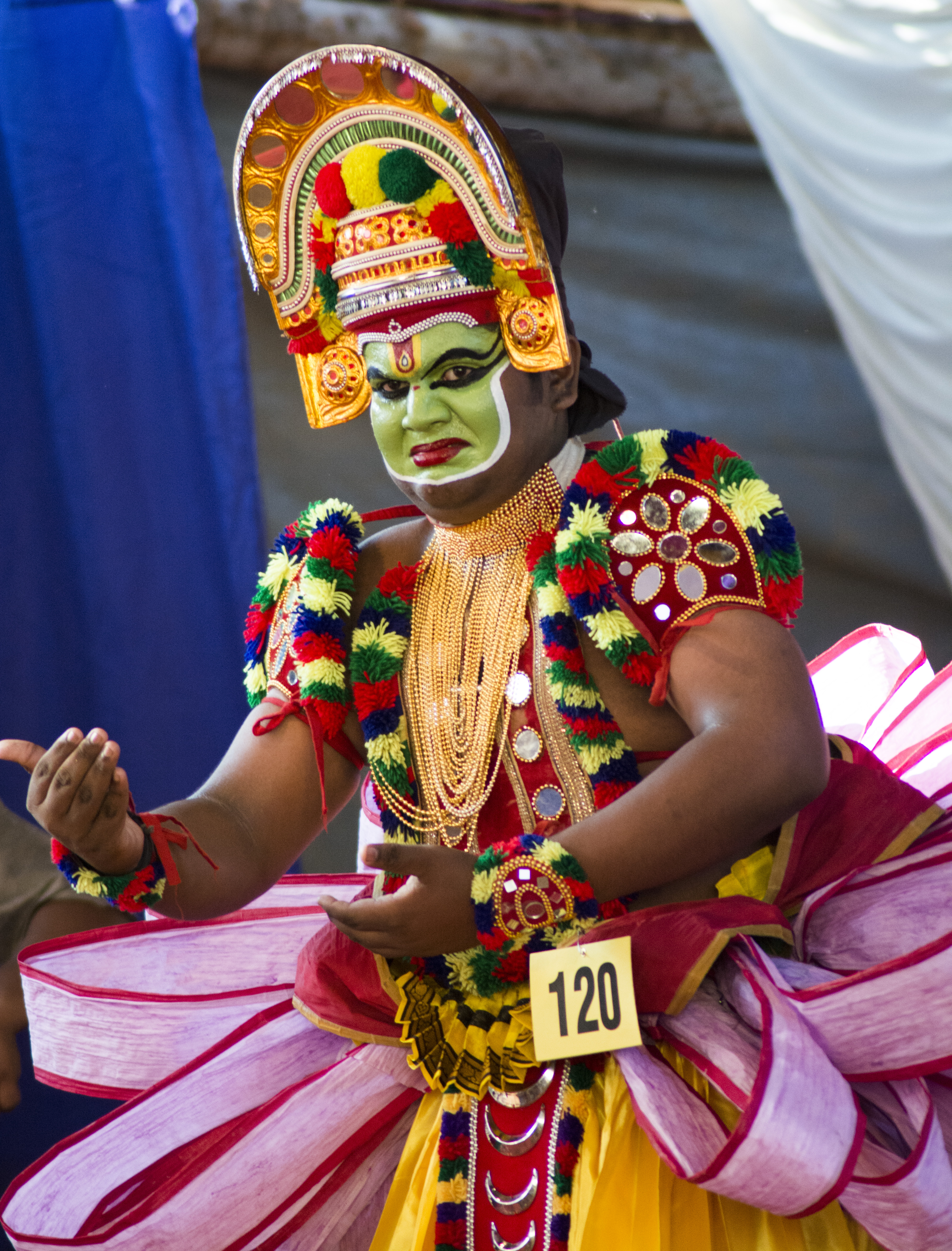 Kerala School Kalolsavam 2017